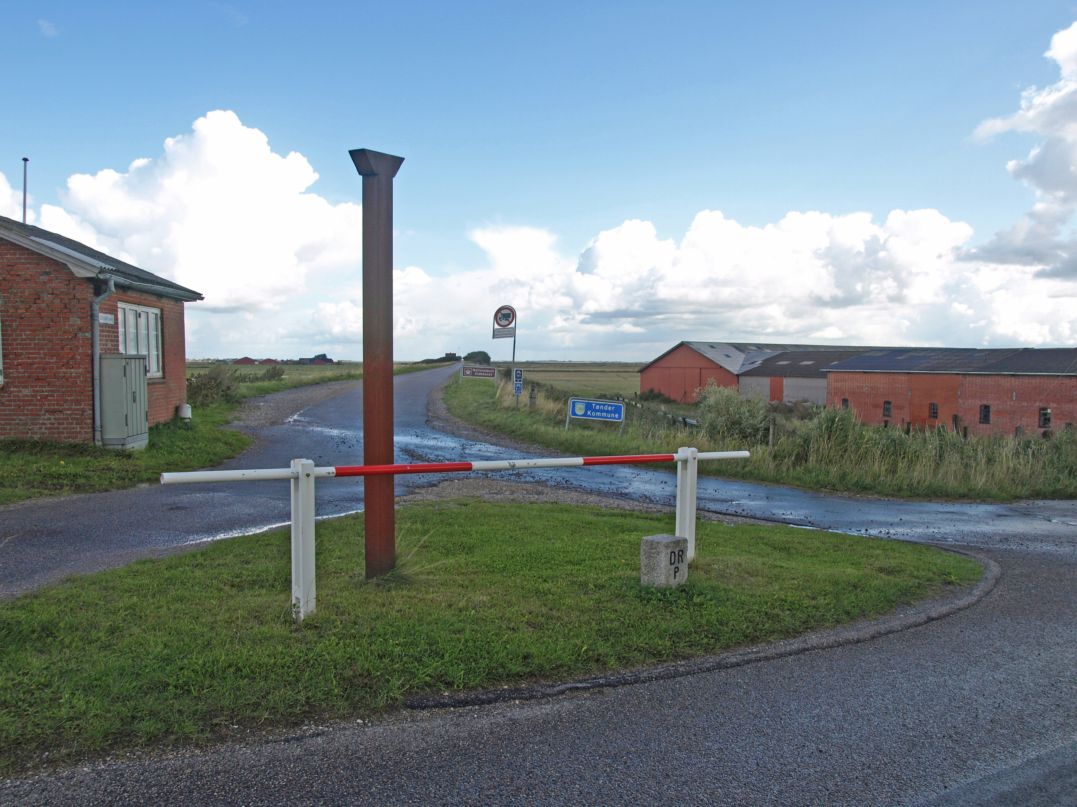 Blick auf den nördlichsten Festlandspunkt Deutschlands am Rickelsbüller Koog mit Grenzstein 277 der deutsch-dänischen Festlandsgrenze